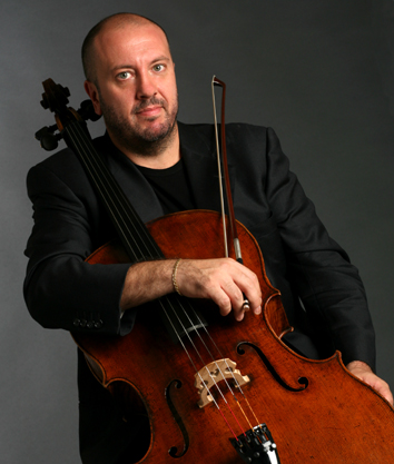 Enrico Dindo